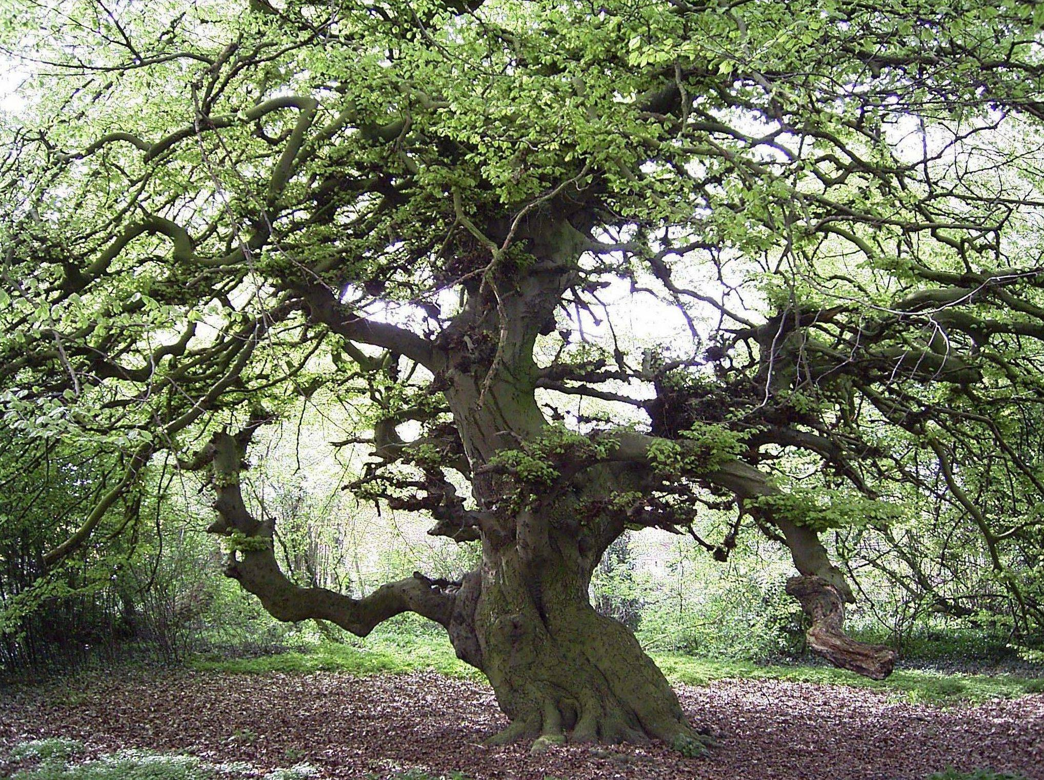 Süntelbuche (Fagus sylvatica 'Tortuosa') im Volkspark in Lauenau. Der knapp 200 Jahre alte Baum hat einen Stammumfang von über 5 m und ist ca. 12 m hoch.